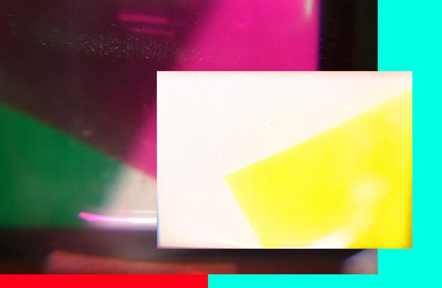 Juan Kasari